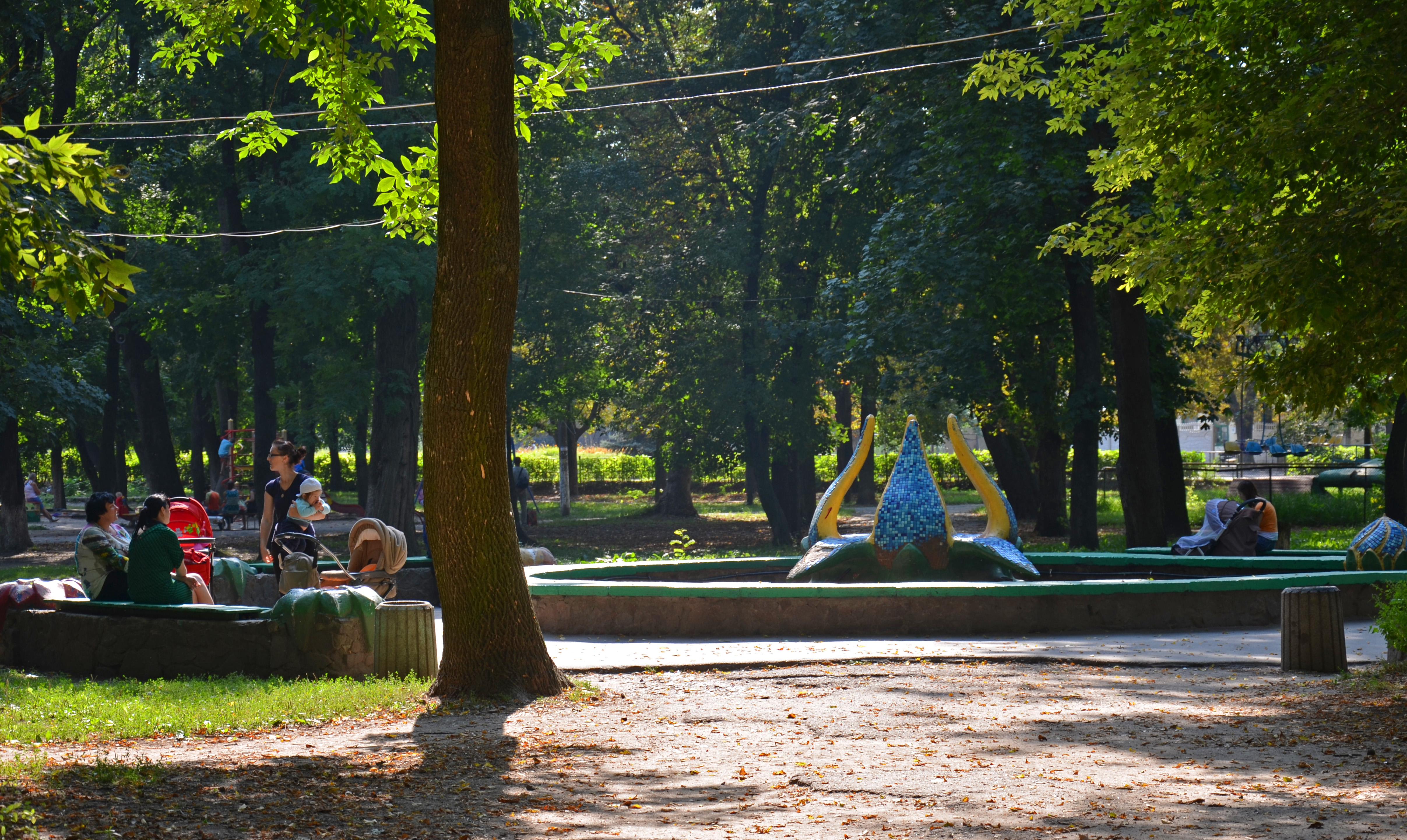 Парк-пам'ятка садово-паркового мистецтва (33,0га), Фастів